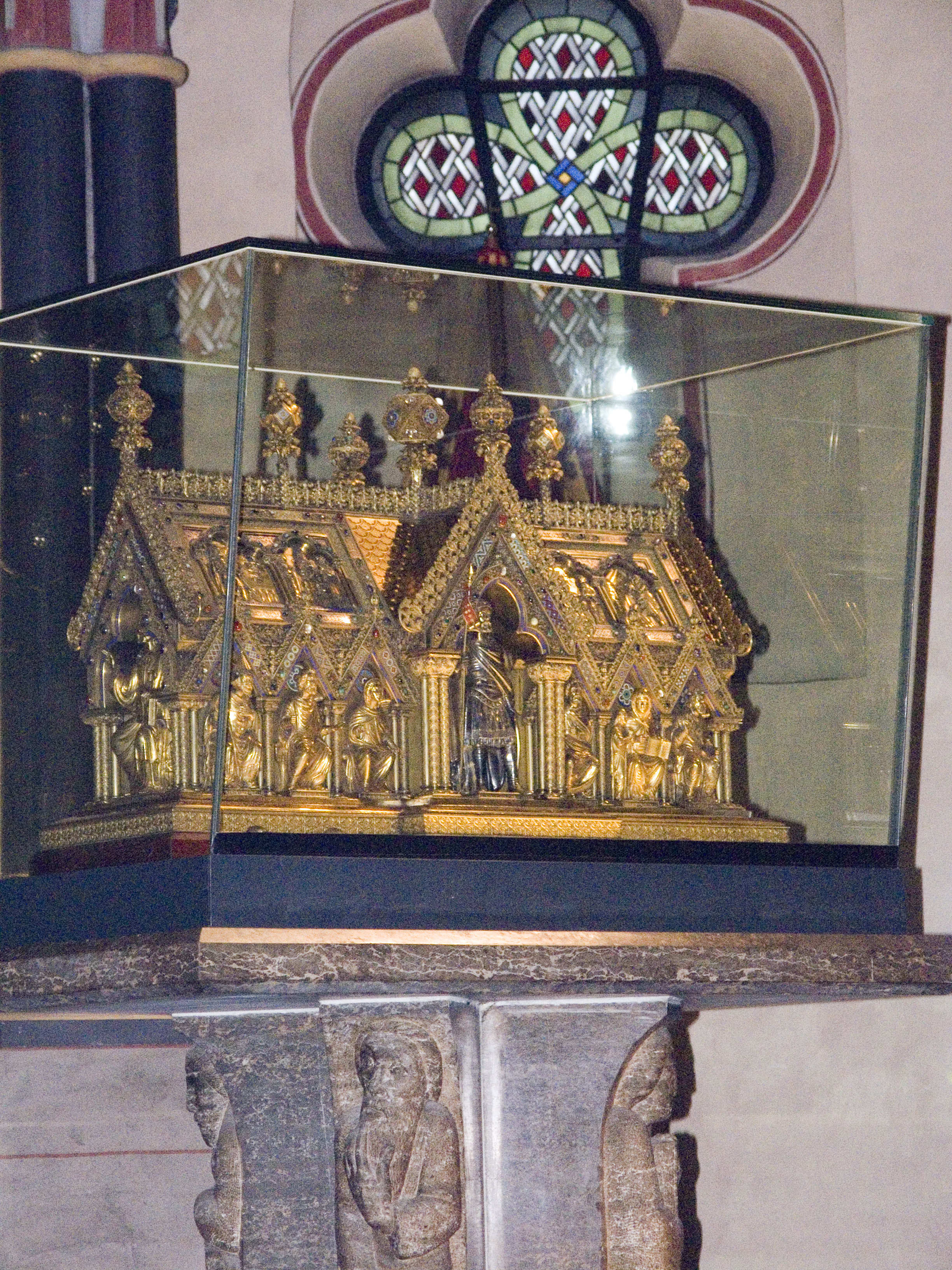 Северный Рейн-Вестфалия, Нойс - Базилика Святого Квиринуса